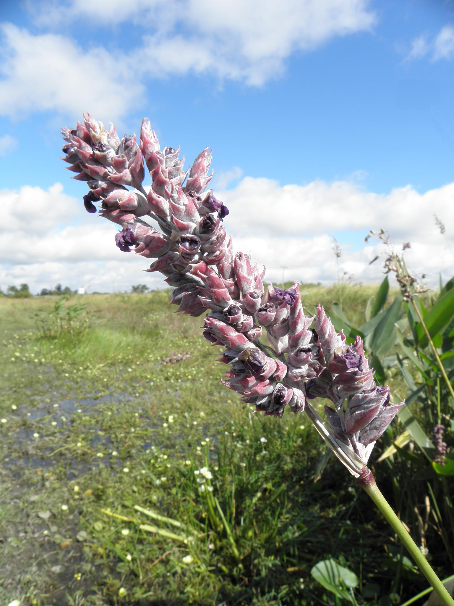 Peguajó (Thalia multiflora).